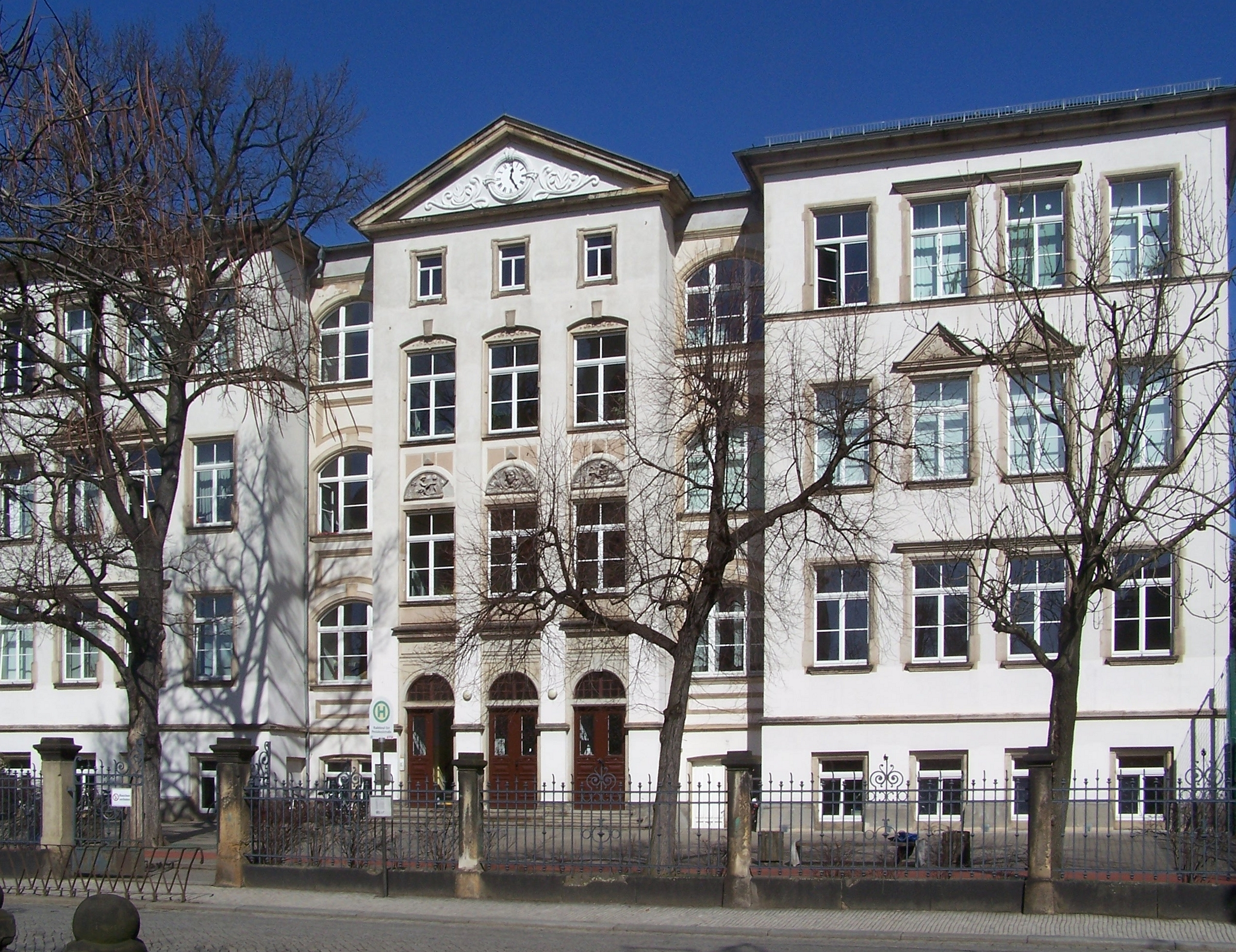 . Pestalozzischule Radebeul, heute genutzt als Haus 2 des Lößnitzgymnasiums